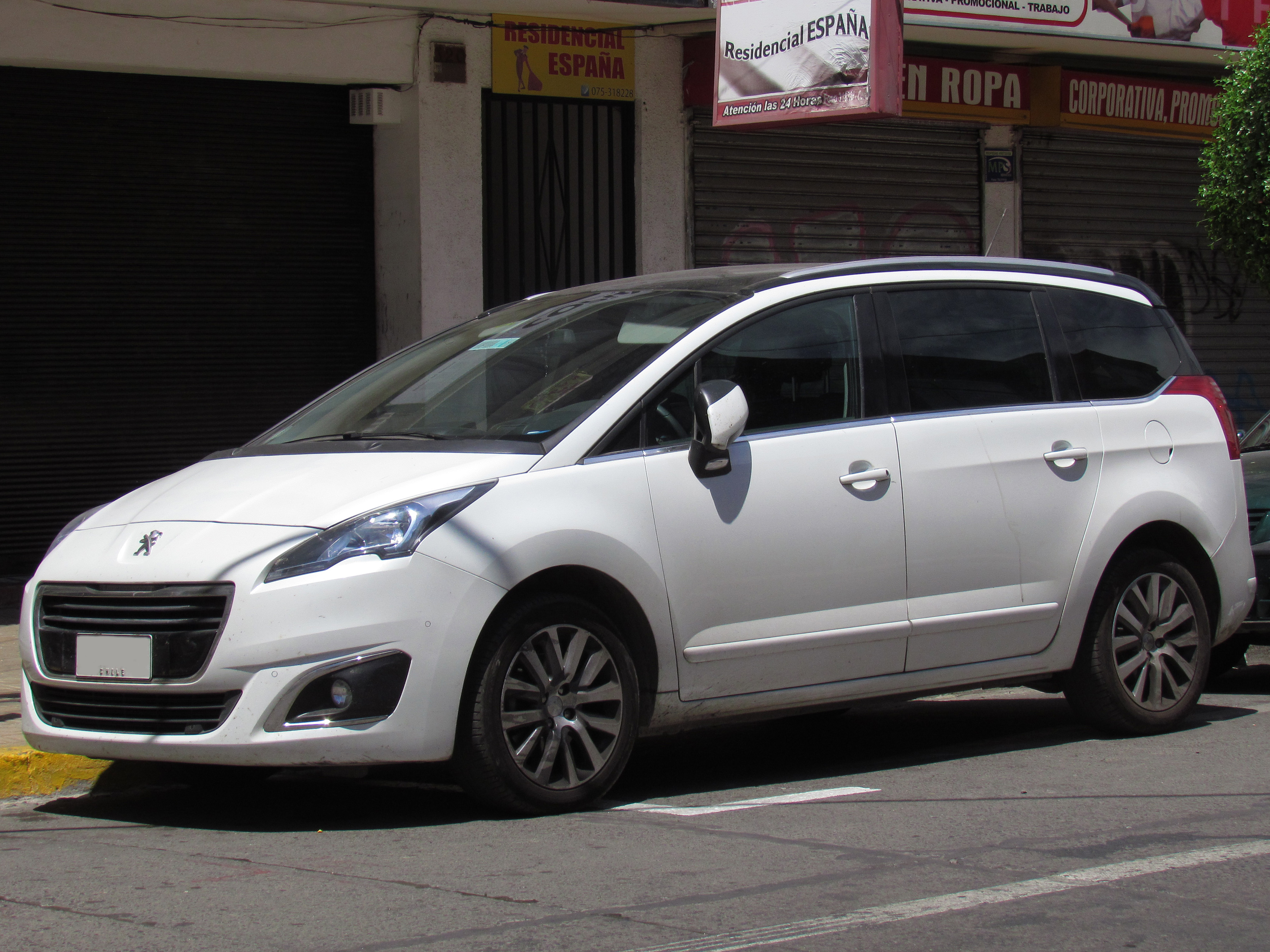 Peugeot 5008 2.0 HDi Allure 2014